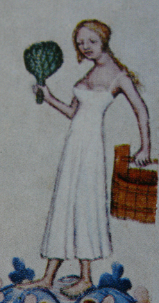 Lazebnice